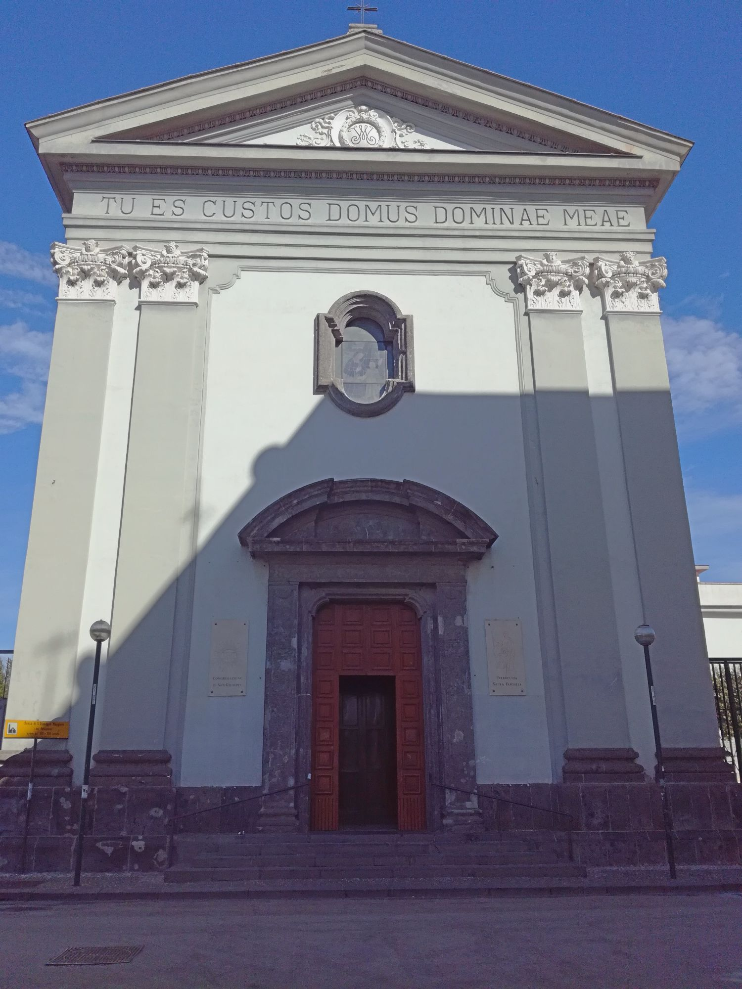 Chiesa di San Giuseppe Maggiore dei Falegnami (Napoli)